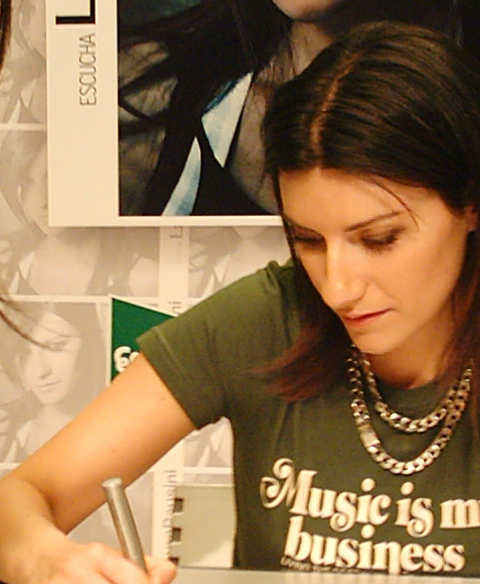 Laura Pausini, Presentazione Album Escucha, 2004